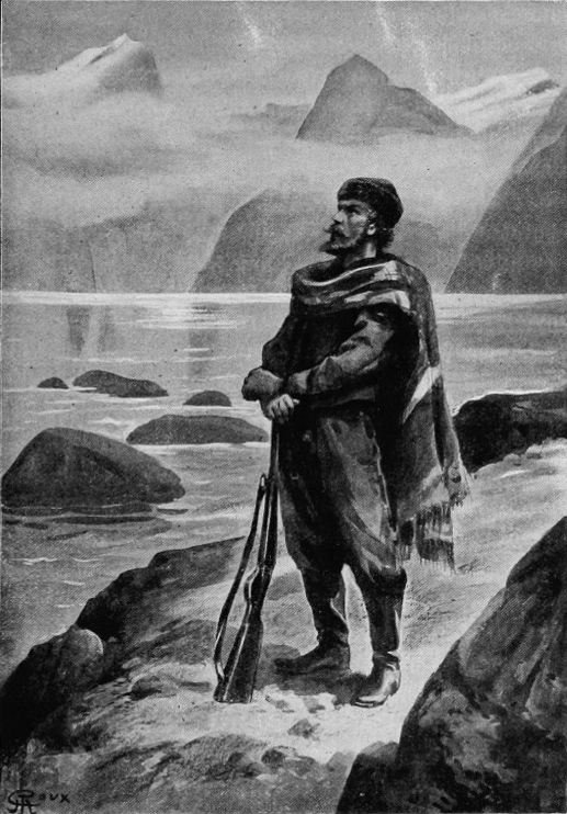 Illustration from Verne - Les Naufragés du Jonathan, Hetzel, 1909.djvu